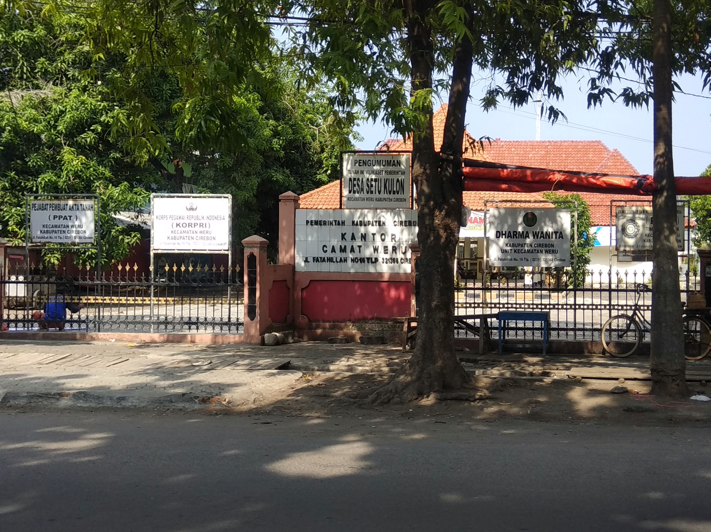 kantor camat weru